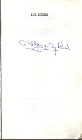 Imagen primera pagina firmada Luz negra.